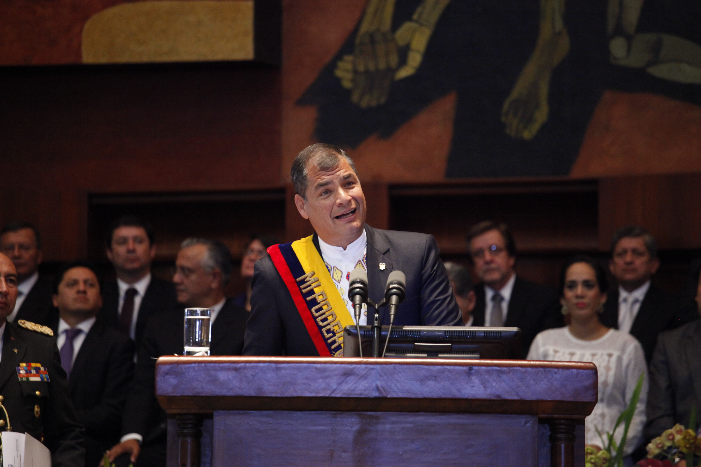 Rafael Correa Delgado, Presidente de la República del Ecuador en el Informe a la Nación. Tema: Informe a la Nación del Presidente de la República en la Sede Legislativa 24 de mayo de 2015 Fotografía: Hugo Ortiz / Asamblea Ecuador